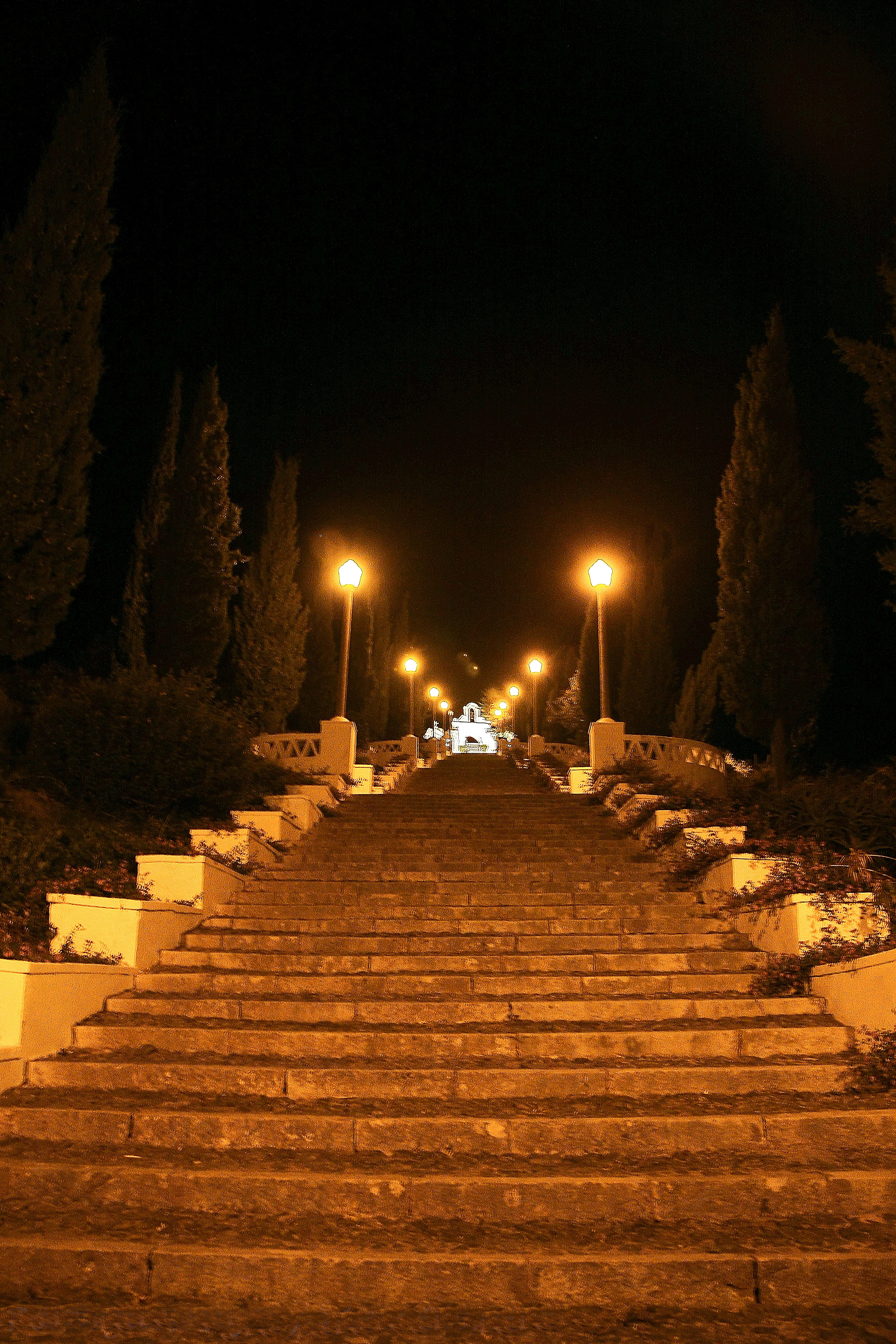 Ermida de peregrinação, situada no concelho de Aljustrel, antecedida por um escadório monumental, uma arcada e um terreiro. Ao seu lado jazem as ruínas do castelo de Aljustrel que foi construído por habitantes árabes entre os séculos VIII e XII, possivelmente no local de antigo castro romanizado.Foi edificada provavelmente no século XVI/XVII. Passado um século, foi aumentado o espaço da nave pela inclusão da antiga galilé e foram construídos o arco e o escadório de acesso. A igreja possui planta composta pelos retângulos justapostos da nave e da capela-mor, sendo esta menor, com anexos também retangulares, correspondentes à sacristia e primitiva casa dos romeiros, hoje habitação particular. Foi decretada Imóvel de Interesse Público. See where this picture was taken. [?]